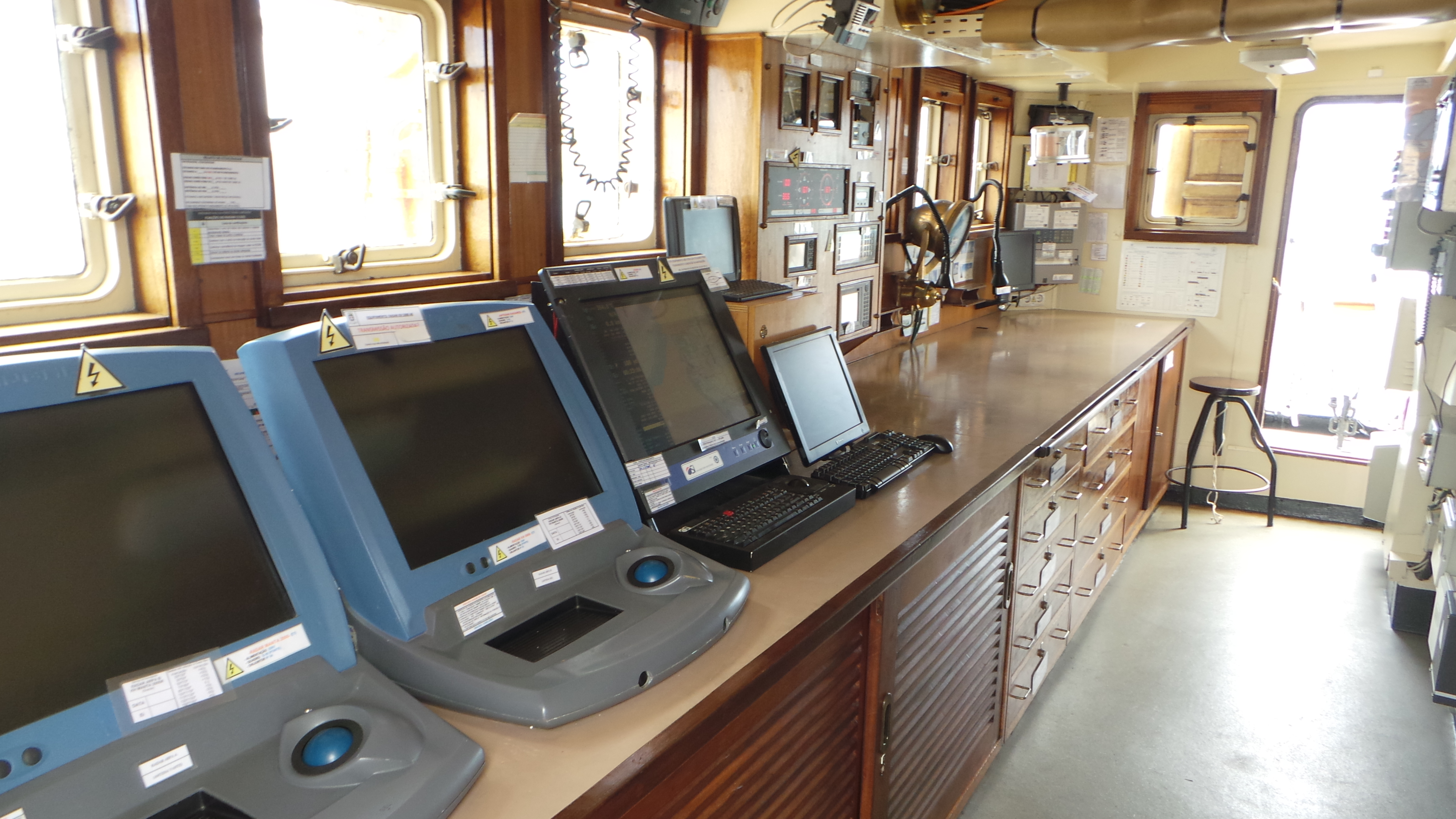 Visita al Buque Escuela NRP Sagres, en La Base Naval de Las Palmas de Gran Canaria. Este fin de semana de semana ( 20, 21 y 22 de junio de 2014) tenemos la oportunidad de disfrutar, en Las Palmas de Gran Canaria, de la visita del buque escuela portugués NRP Sagres, se encuentra atracado en el muelle de la base naval y podrá ser visitado hoy viernes hasta las 19h y mañana sábado de 10 a 12h y de 14 a 19h . El Buque proveniente de Lisboa partirá el domingo hasta Las Azores , para luego regresar a Lisboa, cuenta con unos 60 guardiamarines, con una decena de mujeres entre ellos, que realizan su periodo de instruccion Construido en 1937 en Hamburgo y tras varios avatares, fue adquirido en 1961 por la marina Portuguesa para sustituir al Sagres II, entrando en servicio como Sagres III en febrero de 1962. Tiene 89,5 metros de eslora, 12 de manga y 5,5 de calado, siendo su altura máxima de 45,5 metros. Cuenta además con 1.971 metros cuadrados de vela y desplaza 1.893 toneladas. La figura del mascarón de proa del Sagres III es el Infante D. Henrique nacido el 4 de marzo de 1394, siendo uno de los impulsores de la expansión y descubrimientos portugueses de la época. Más información del Buque : Web del Buque